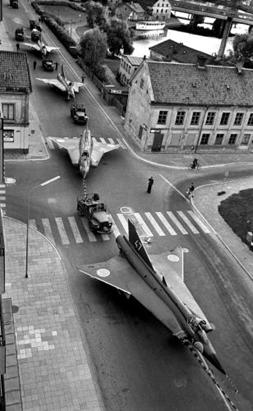 Flygtransport av fjorton J 35D Draken, från F 3 i Malmslätt till Saabs flygfält. Bilden är tagen vid Hamngatan vid Stångebro i central Linköping den 29 juli 1966.